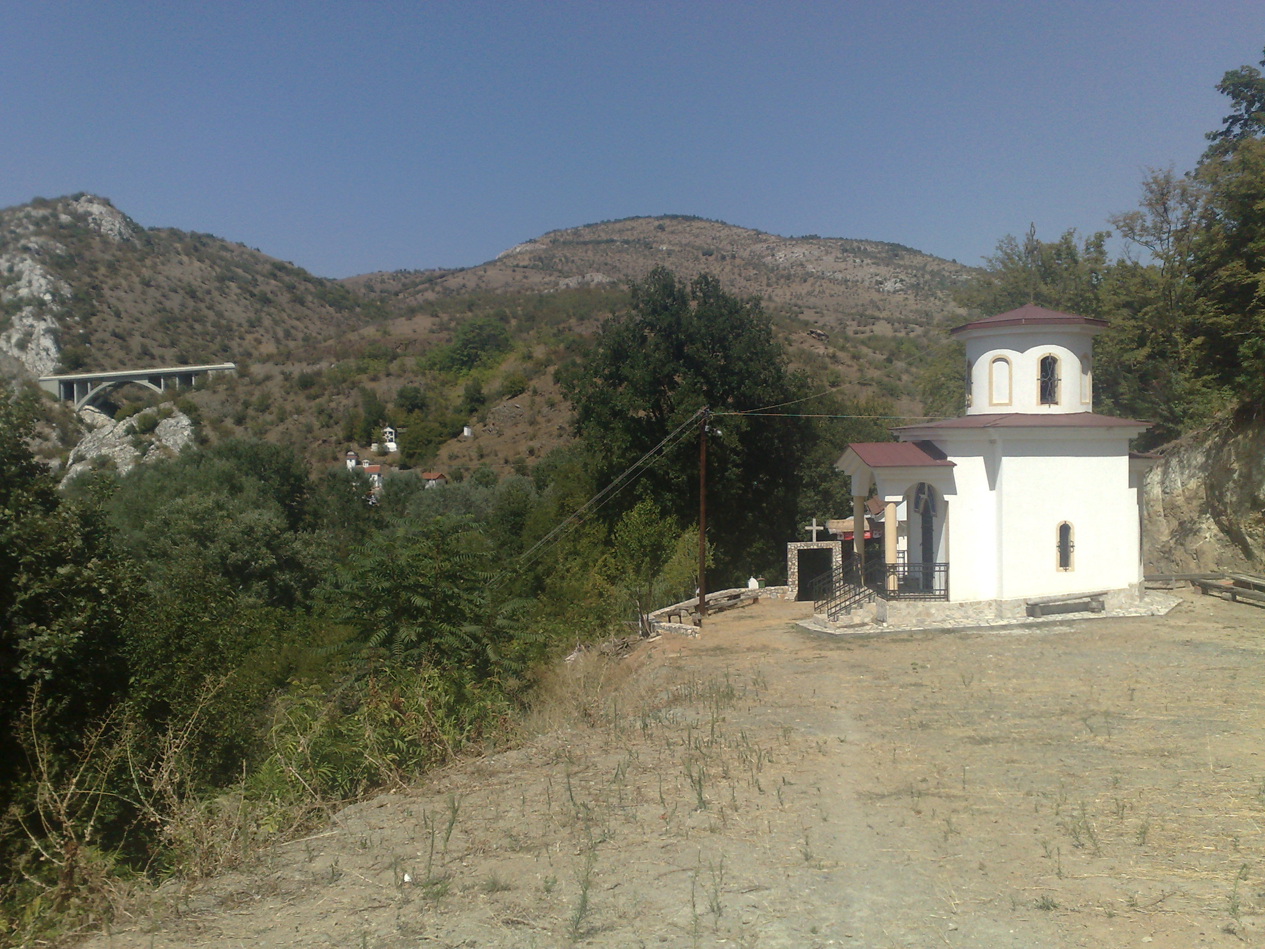 Црква Св. Петка кај с. С'лп (Велешко)